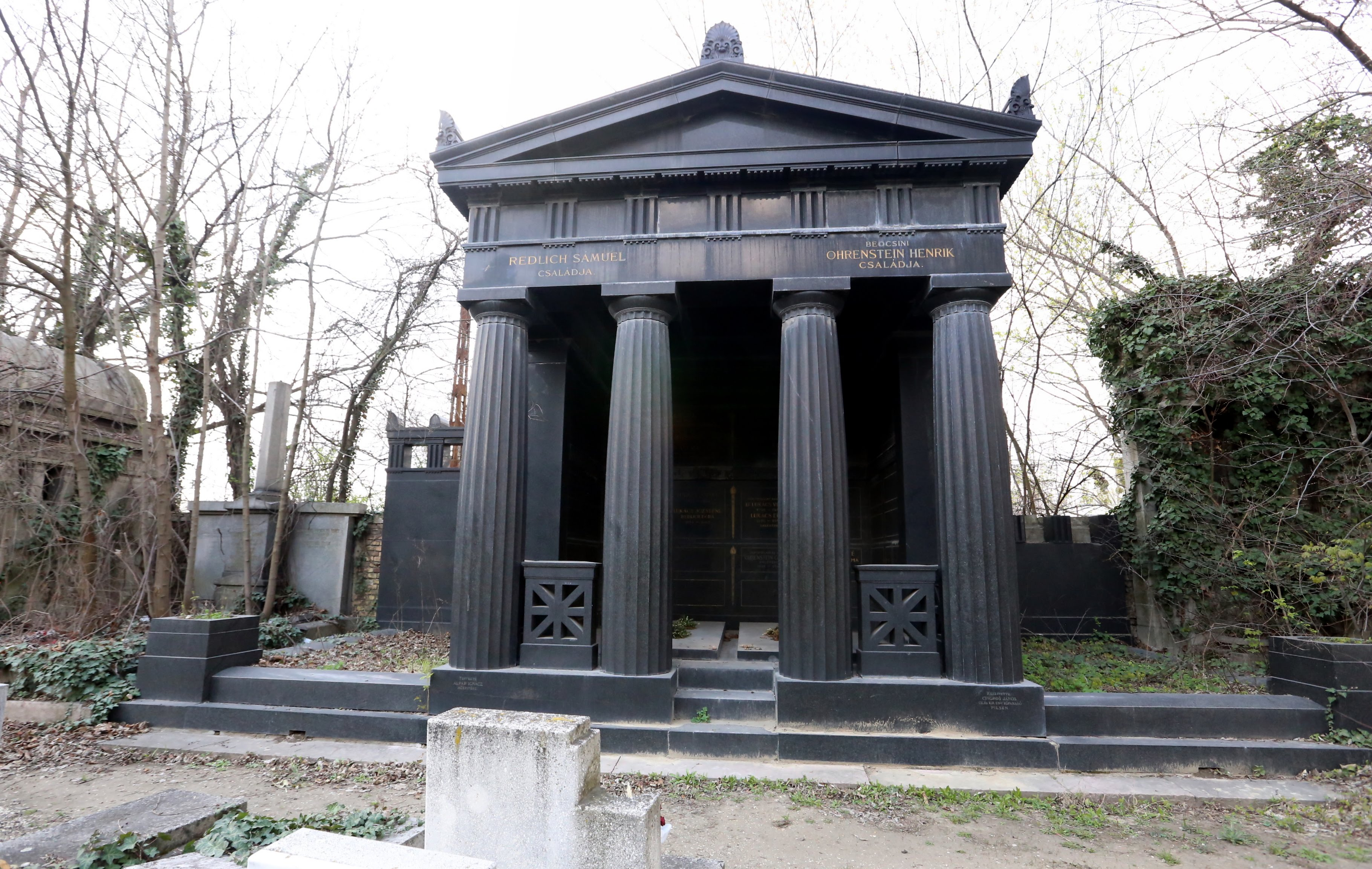 Budapest (Kozma utcai izraelita temető), Ohrenstein Henrik és Redlich Sámuel síremléke, 1902